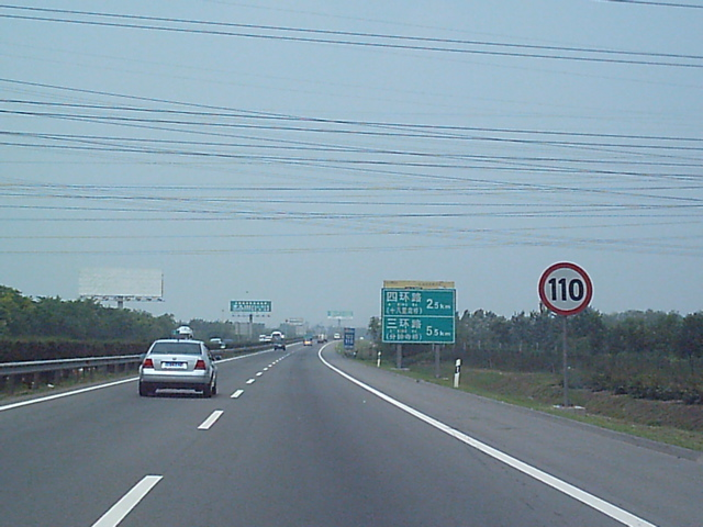 京津塘高速公路，CNDF08在2004年拍照的图片